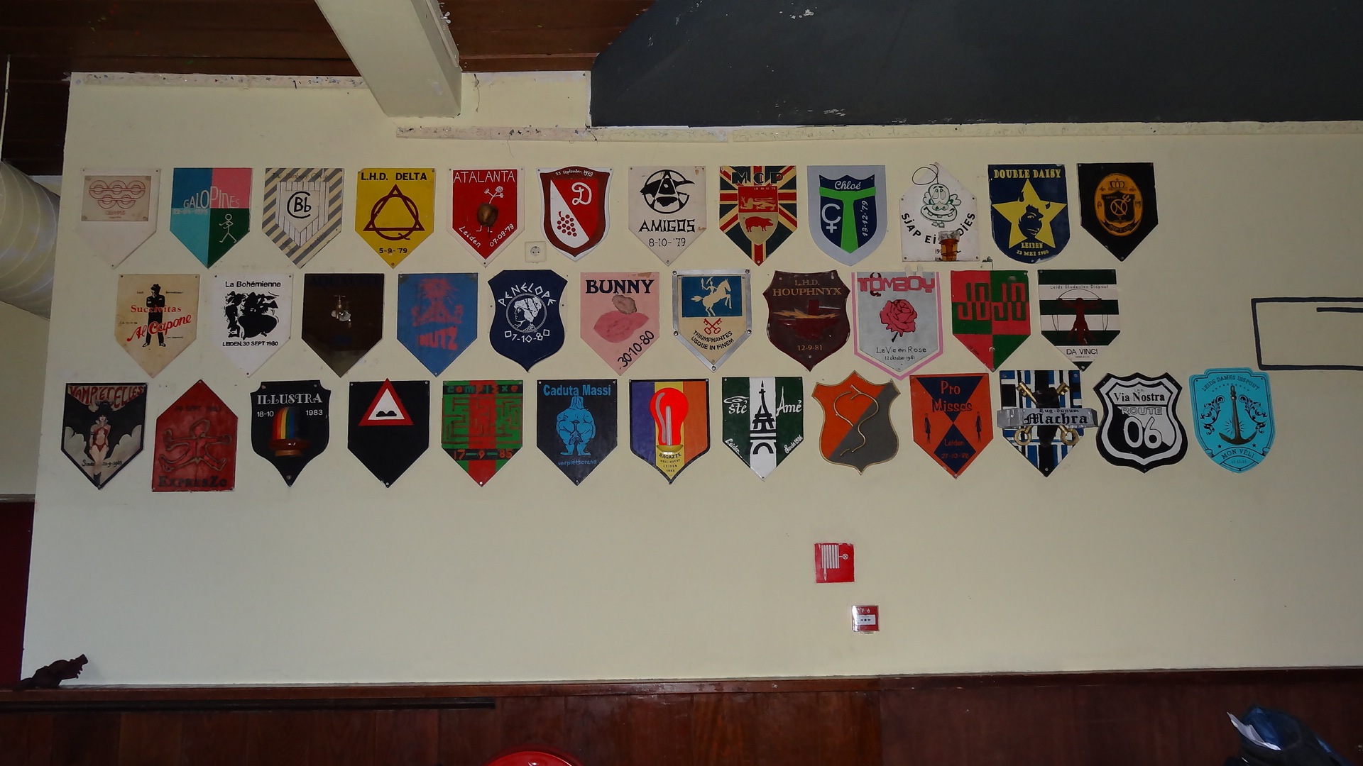 ALSV Quintus disputen 2011